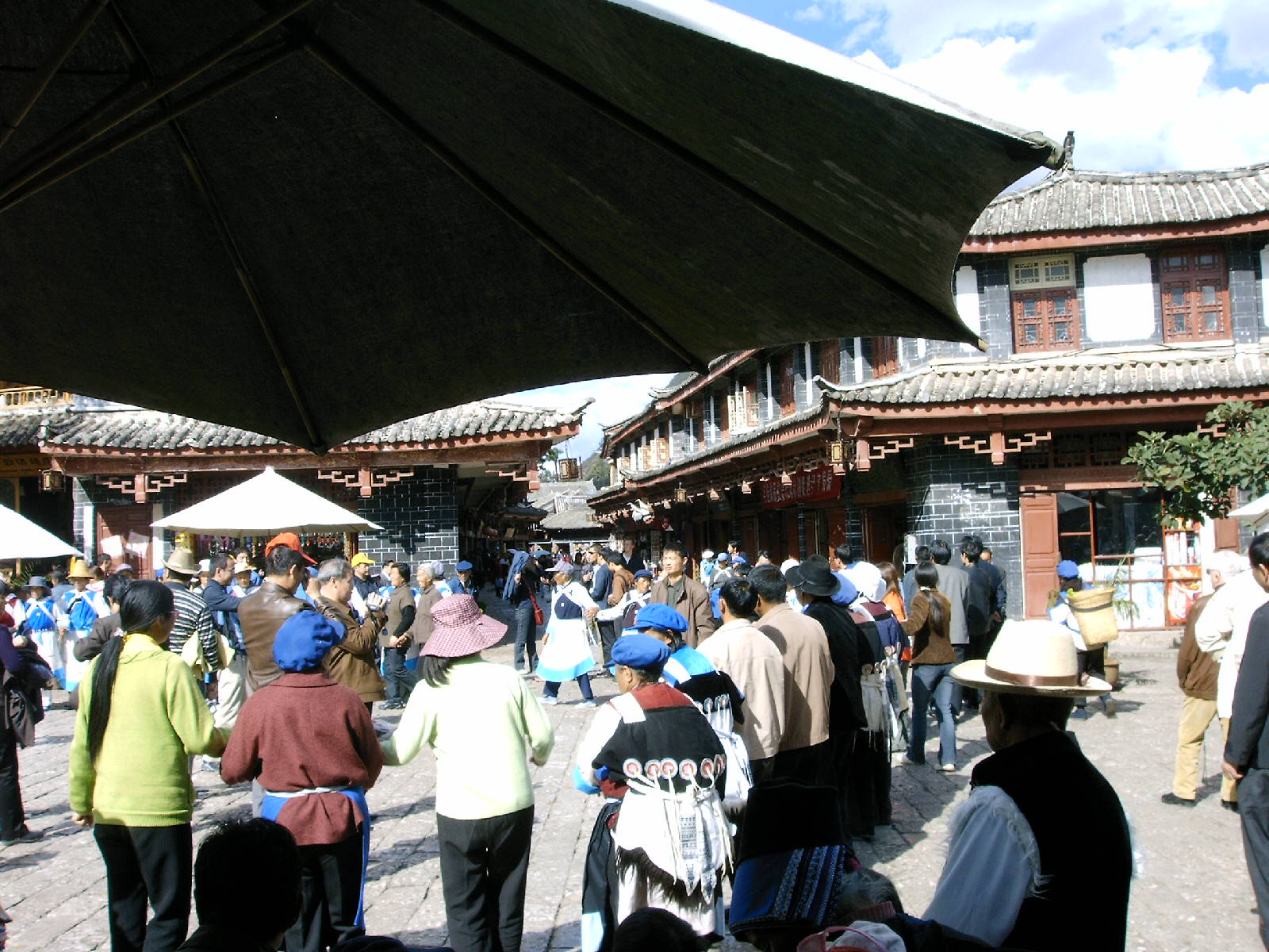 Marktplatz von Lijiang, China